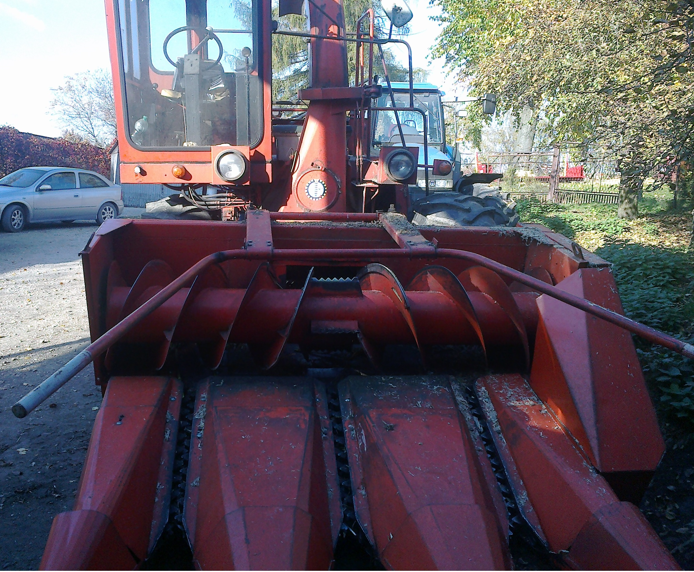 Sieczkarnia Z350/3 i Z344 - przód